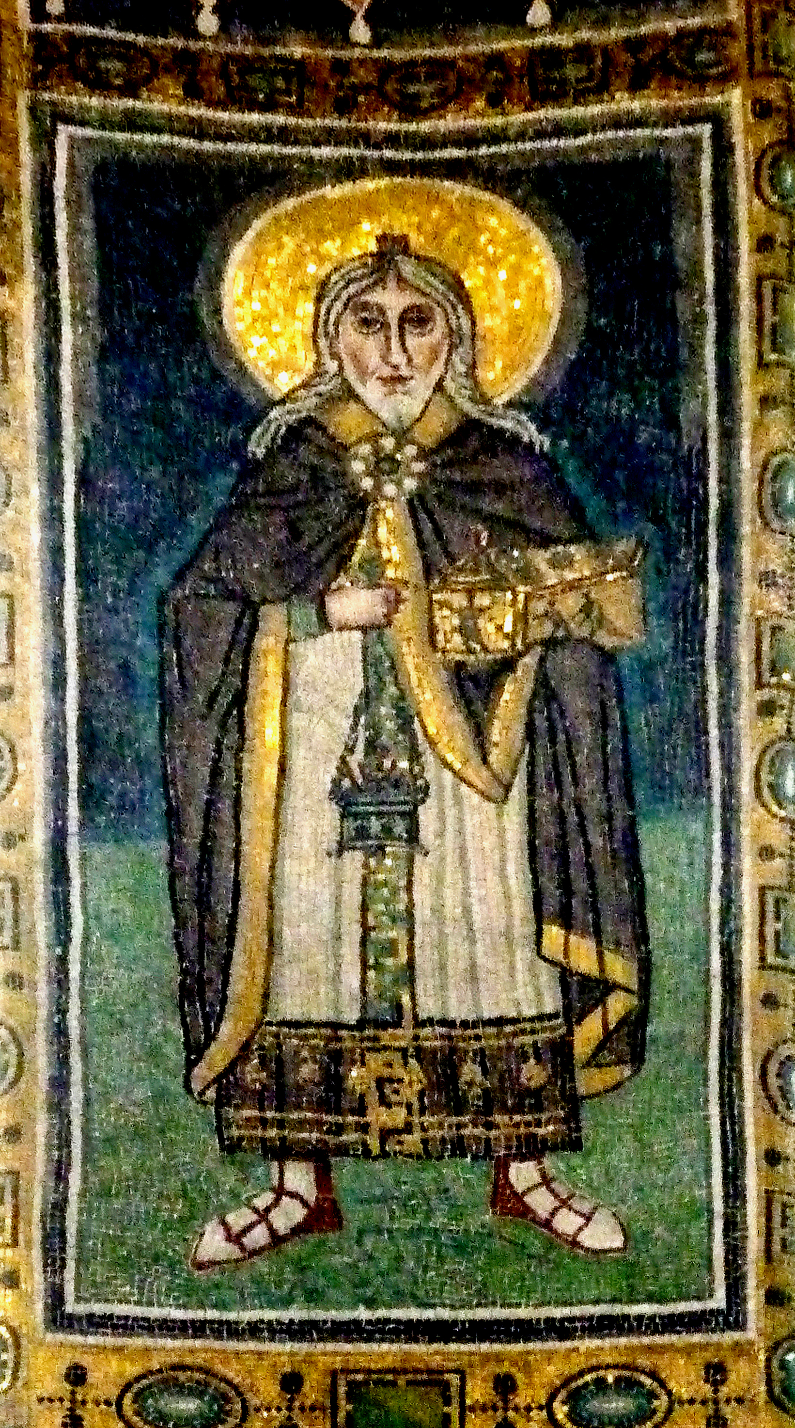 Mozaikkép a szentélyből a poreči Euphrasius-bazilika szentélyében (Horvátország)